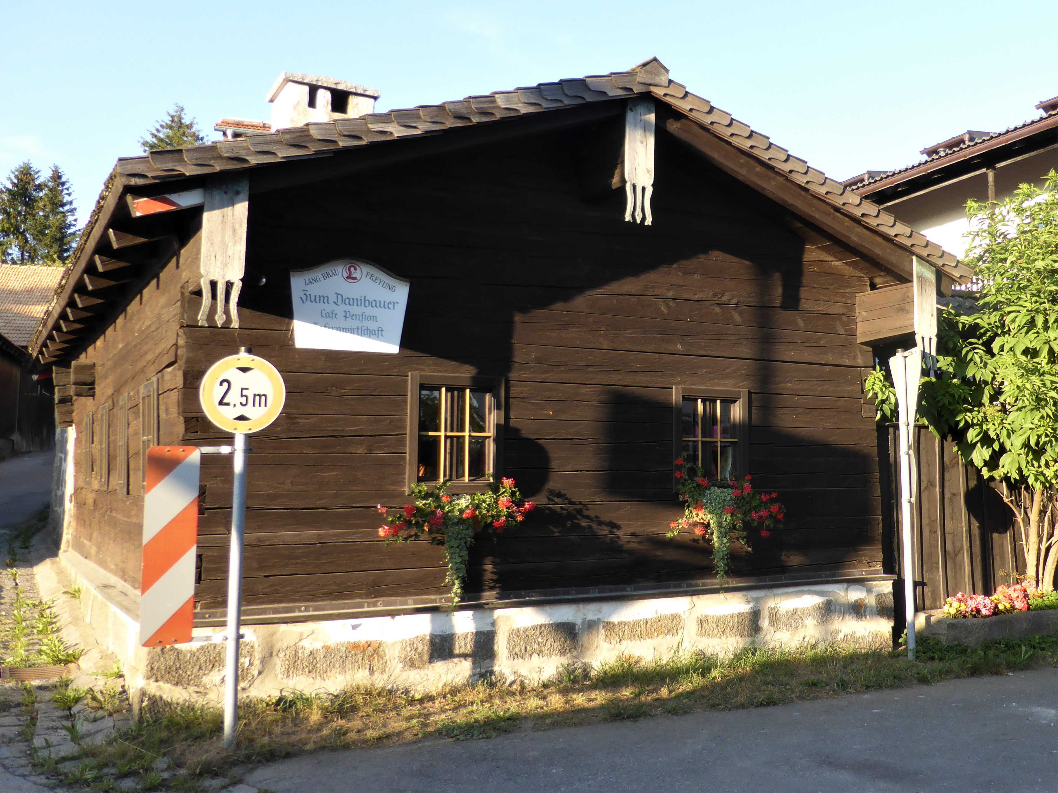 Ehemaliges Austragshaus in Falkenbach 2, Freyung.This is a photograph of an architectural monument.